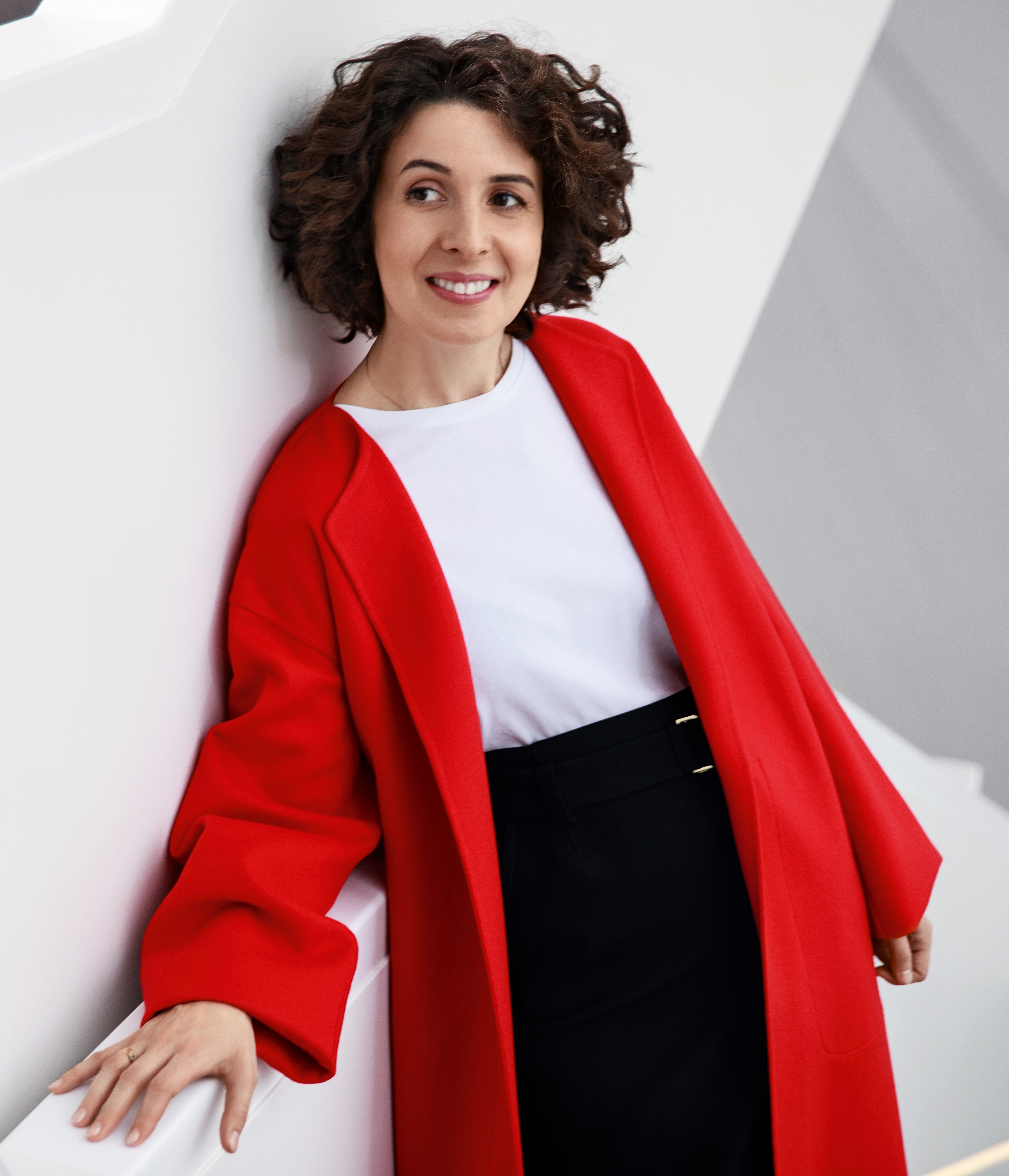 Генеральный директор компании «Яндекс» в России Елена Бунина